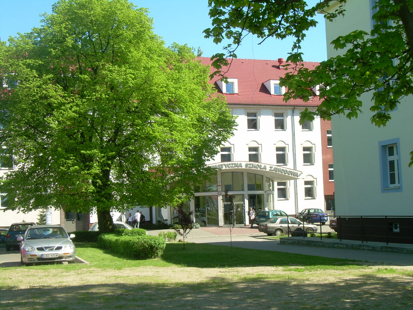 Dawny budynek koszar wojskowych, później Wyższa Informatyczna Szkoła Zawodowa, obecnie, od 2015 r., Urząd Miasta ( część wydziałów m. in. Wydział Komunikacji i Wydział Infrastruktury Miejskiej ) i Oddział Celny.